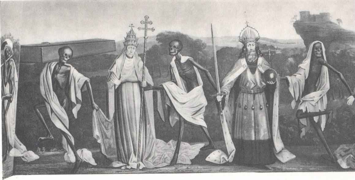 Totentanz Bild 1/9